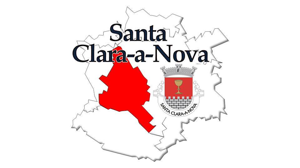 Evolução da População